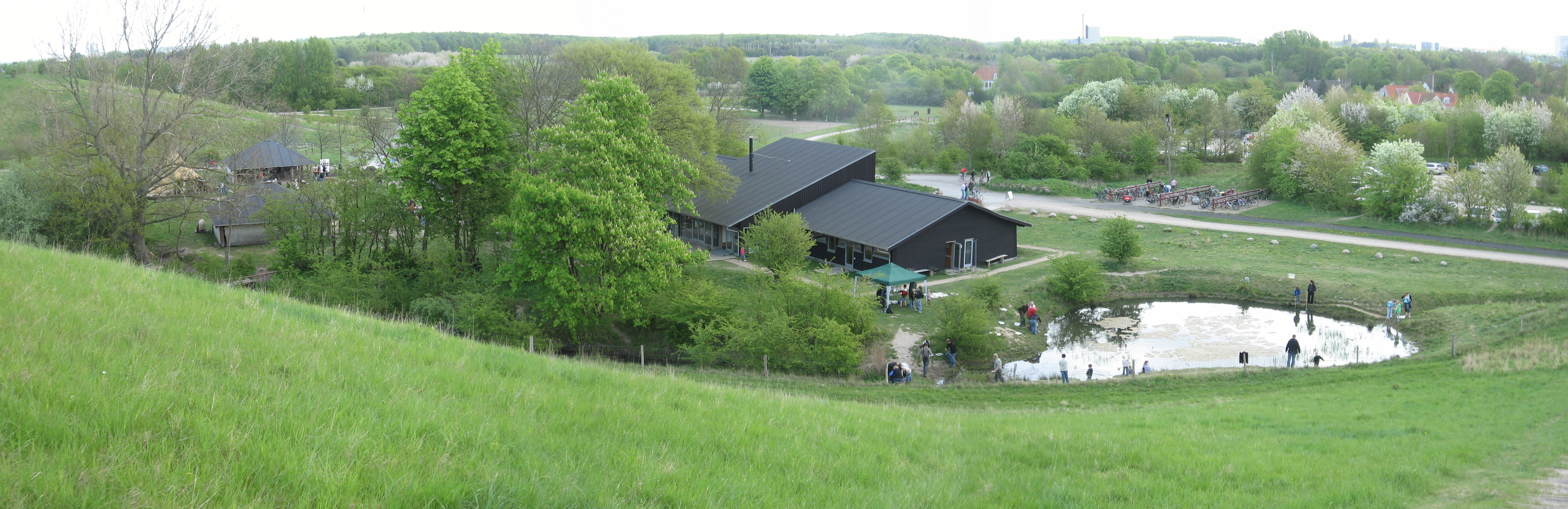 Aktivitet i og omkring Naturcenter Herstedhøje i forbindelse med Skovens Dag 2009